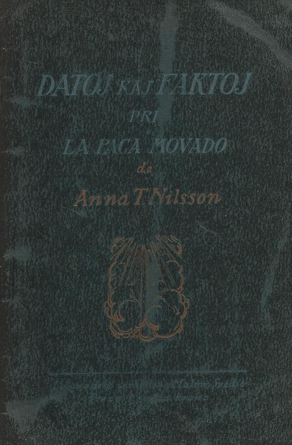 kovrilo de "Datoj kaj Faktoj pri la Paca Movado", 1965